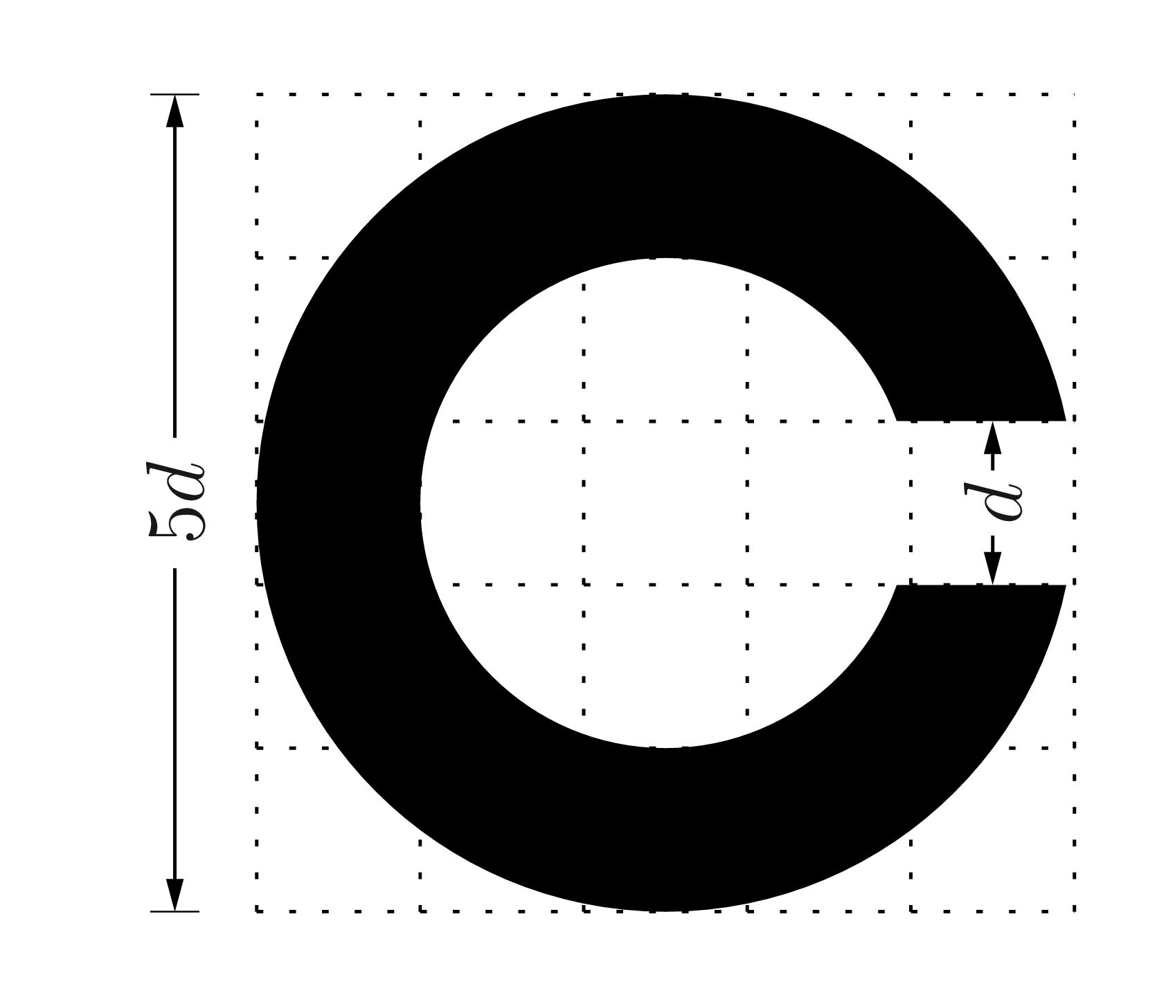 Abmessungen des Landoltrings. Der Abstand d ist der für die Bestimmung des Visus relevante Größe.